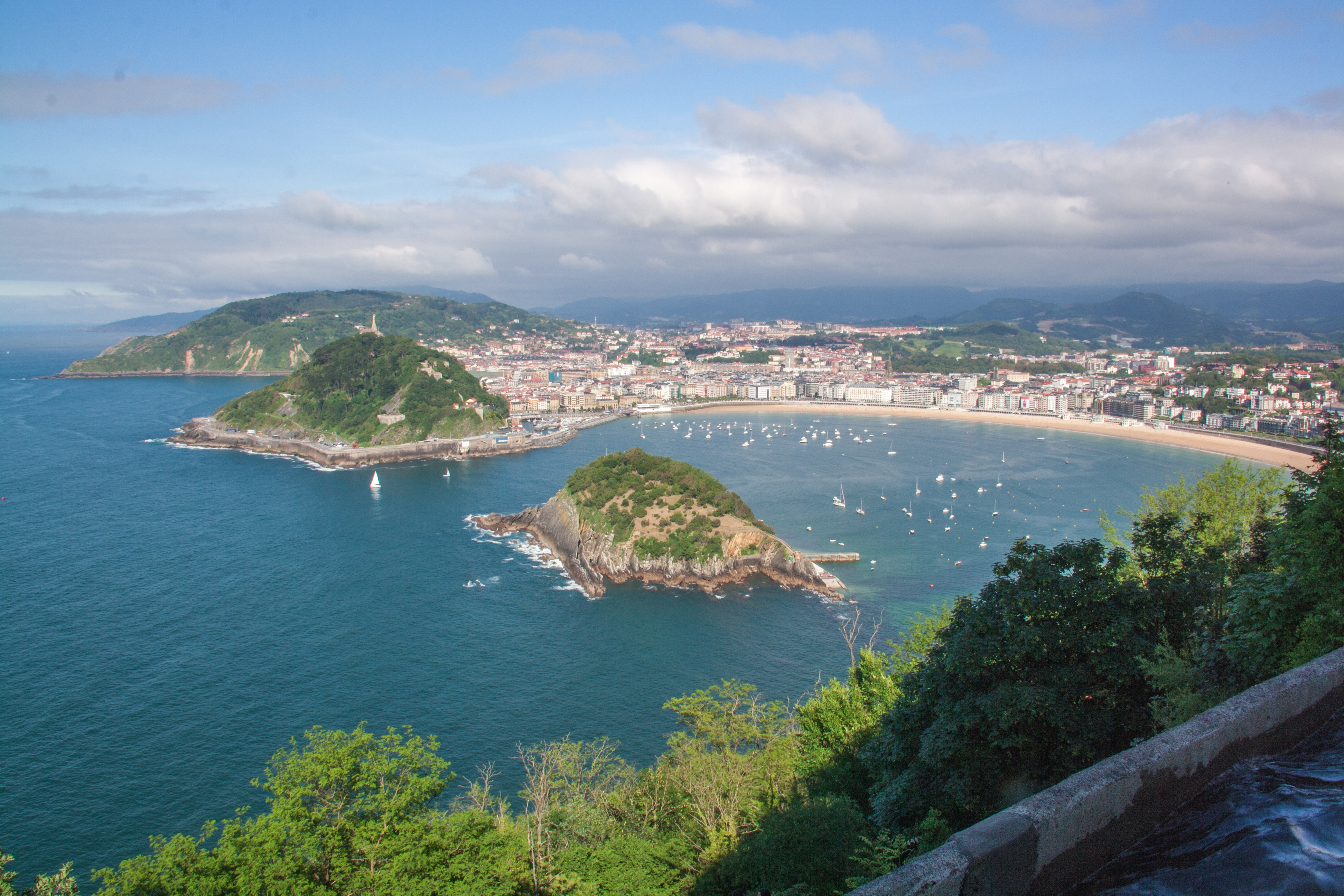 San Sebastián, España